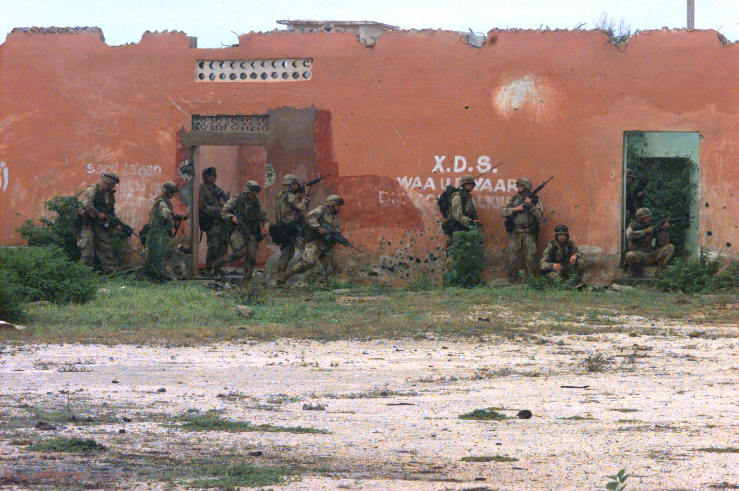 US Marines, armed with M-249 SAW machine guns and M-16A2 rifles, conduct a building-to-building sweep of the weapons cantonment area seized in an early morning raid. As the 6:00 a.m. deadline to surrender the area was ignored, US Marines from Task Force Mogadishu surrounded and seized Gen. Aideed's weapons cantonment area in the northern part of the capital city.